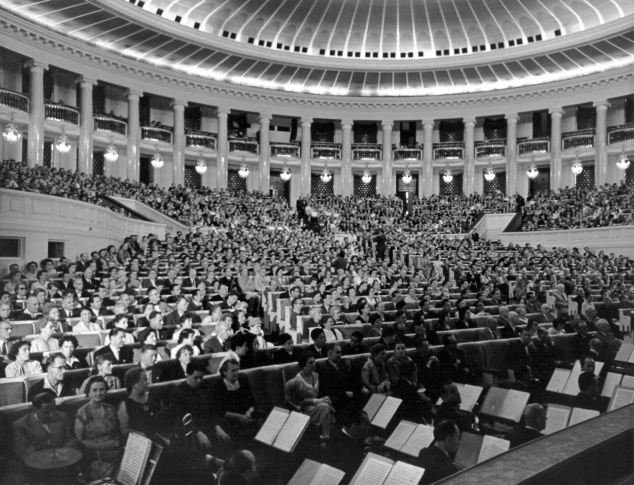 Solena malfermo de UK 1959 en Varsovio, Pollando.